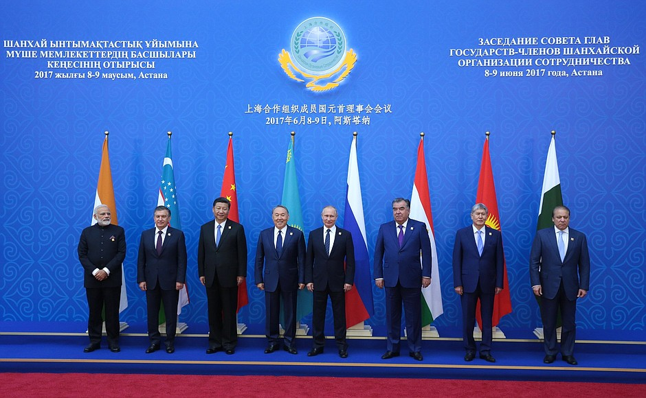 Саммит Шанхайской организации в Казахстане, 2017 год